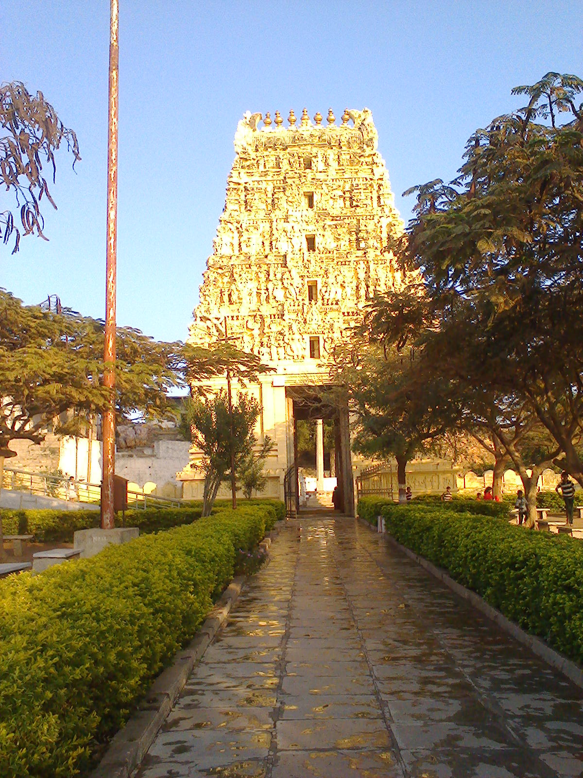 లోపలి నుండి ద్వారగోపురం